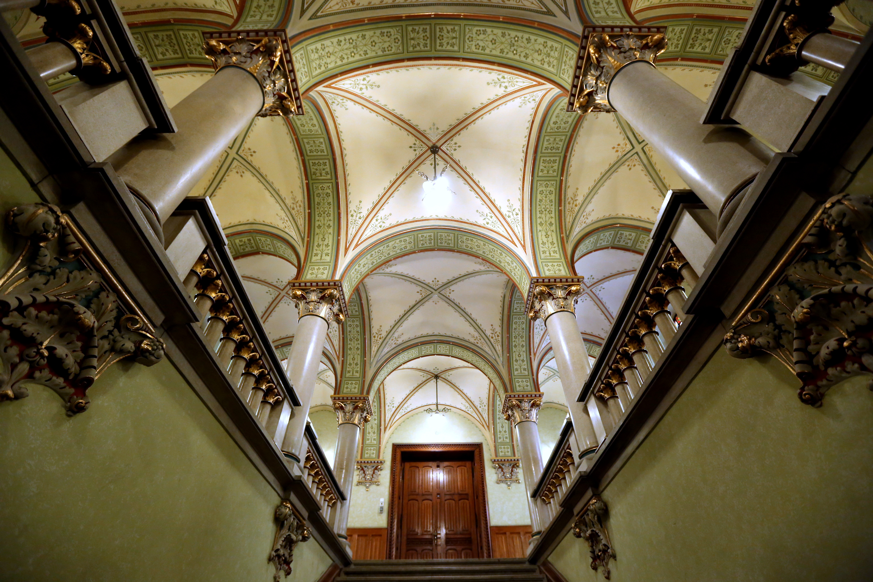 Pázmány Péter Katolikus Egyetem Jog- és Államtudományi Kar - lépcsőház. Budapest VIII. kerület, Szentkirályi utca 28-30. szám